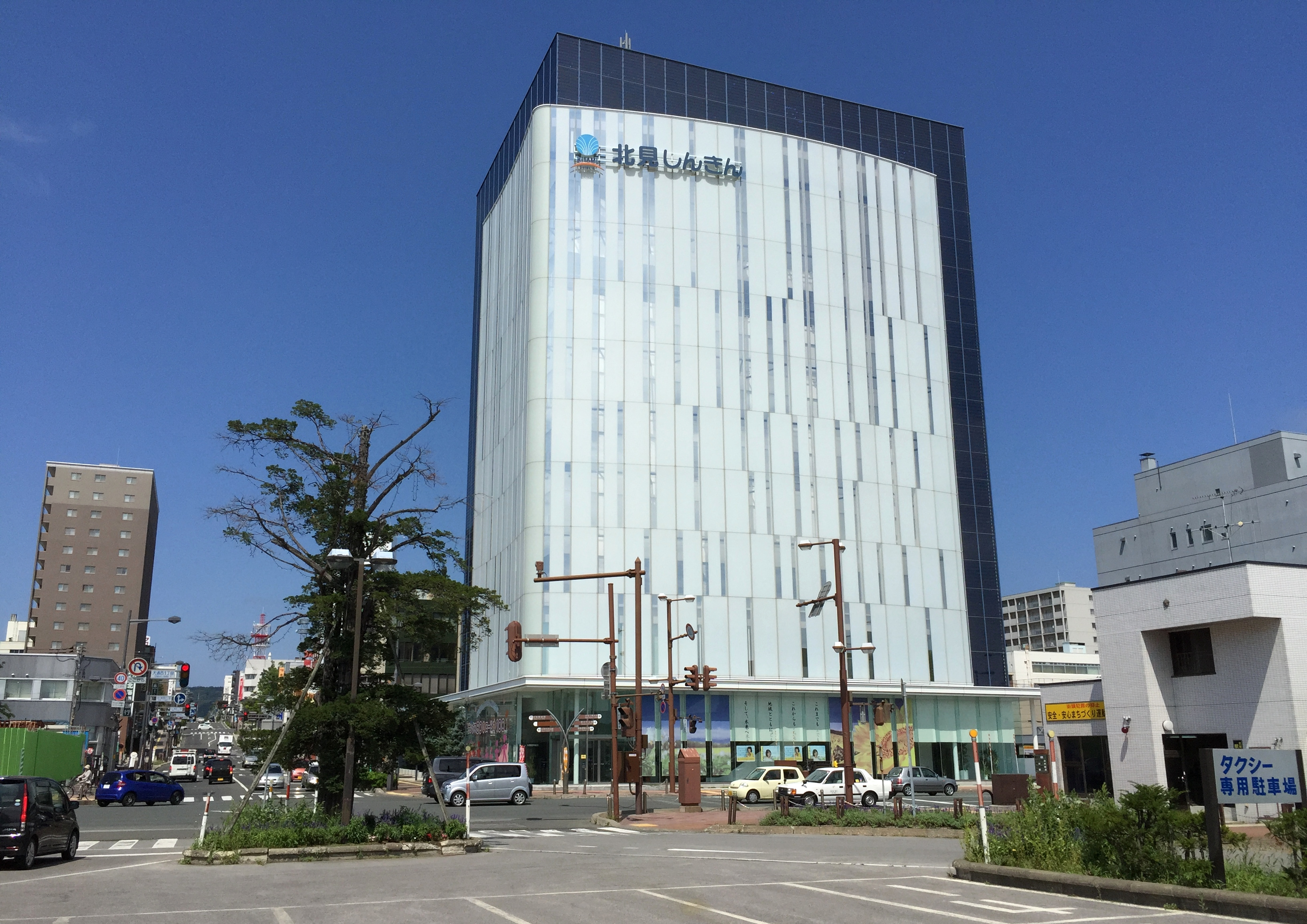 北見信用金庫